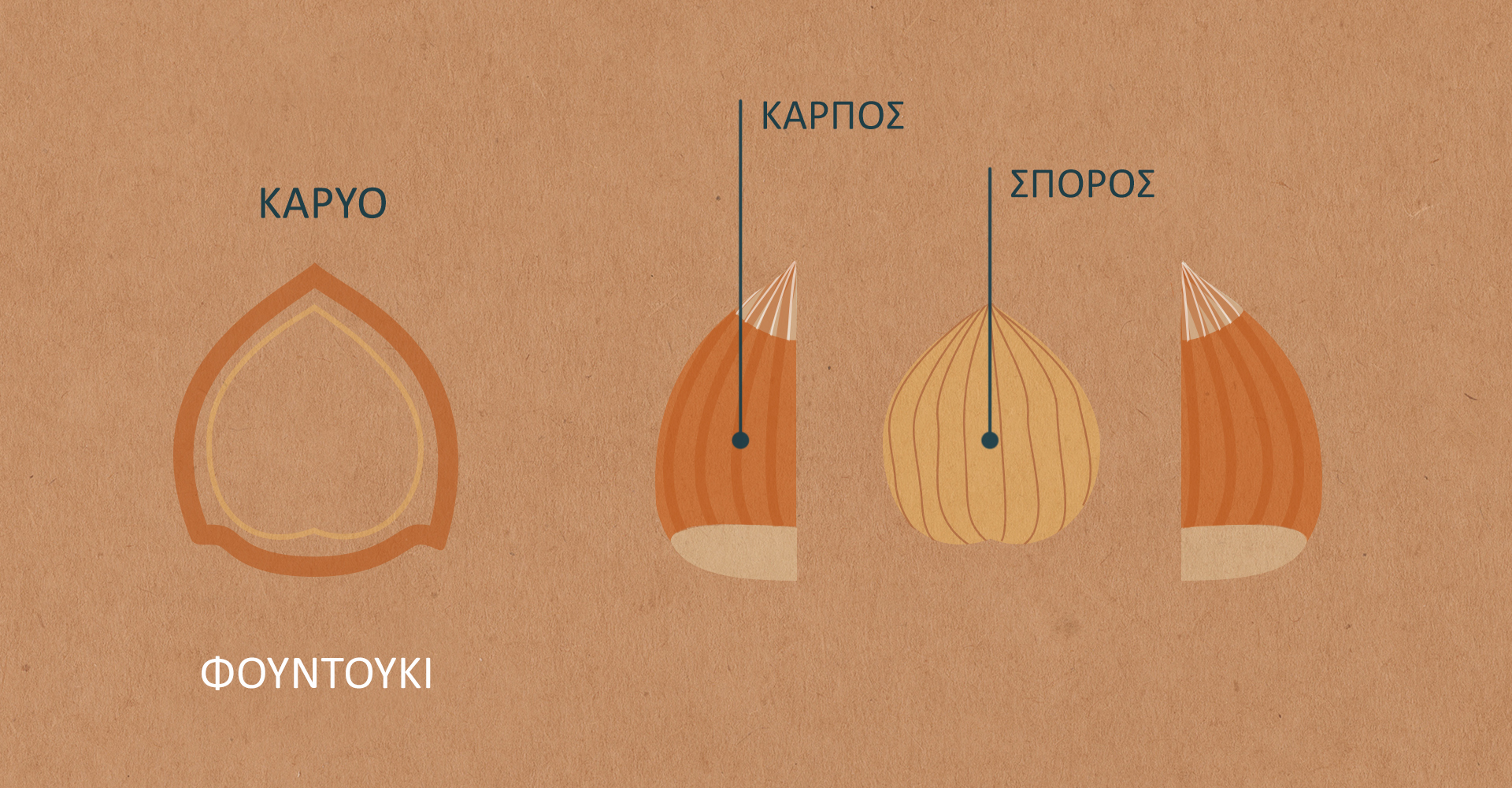 Διάγραμμα καρύου. Διάκριση μεταξύ σπόρου και καρπού.